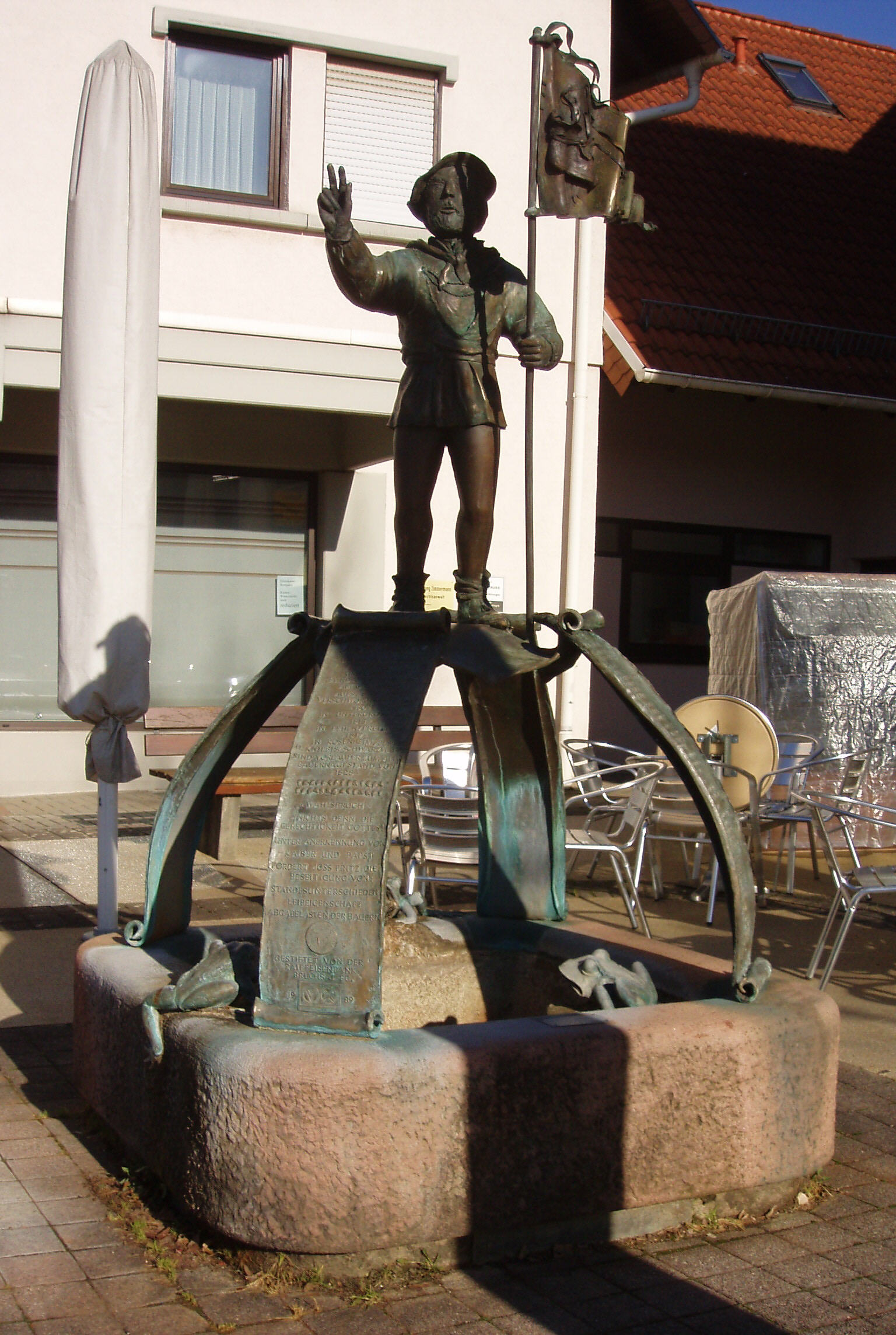 Brunnen in Untergrombach